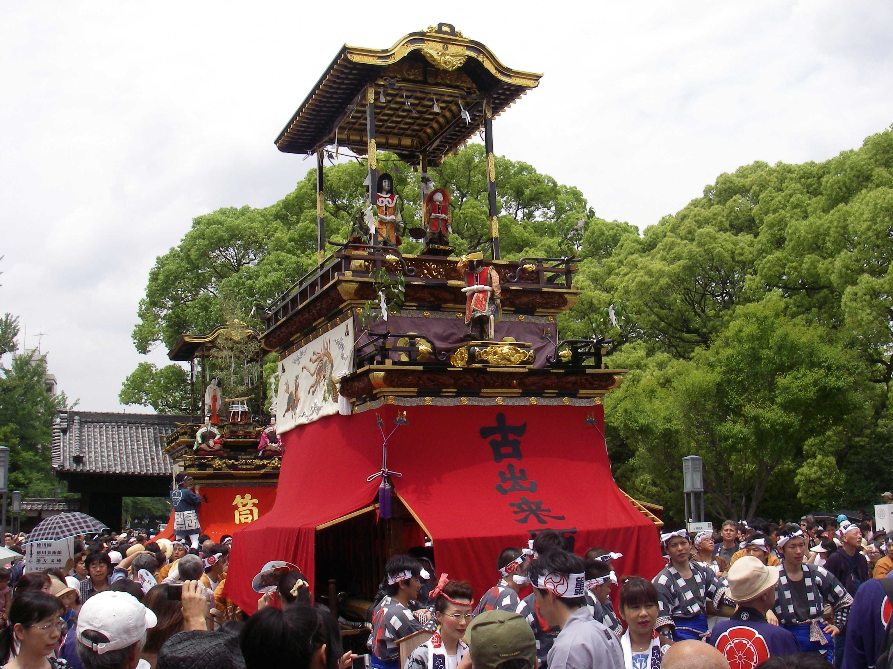 王羲之車（名古屋市東区古出来）徳川園山車揃えにて